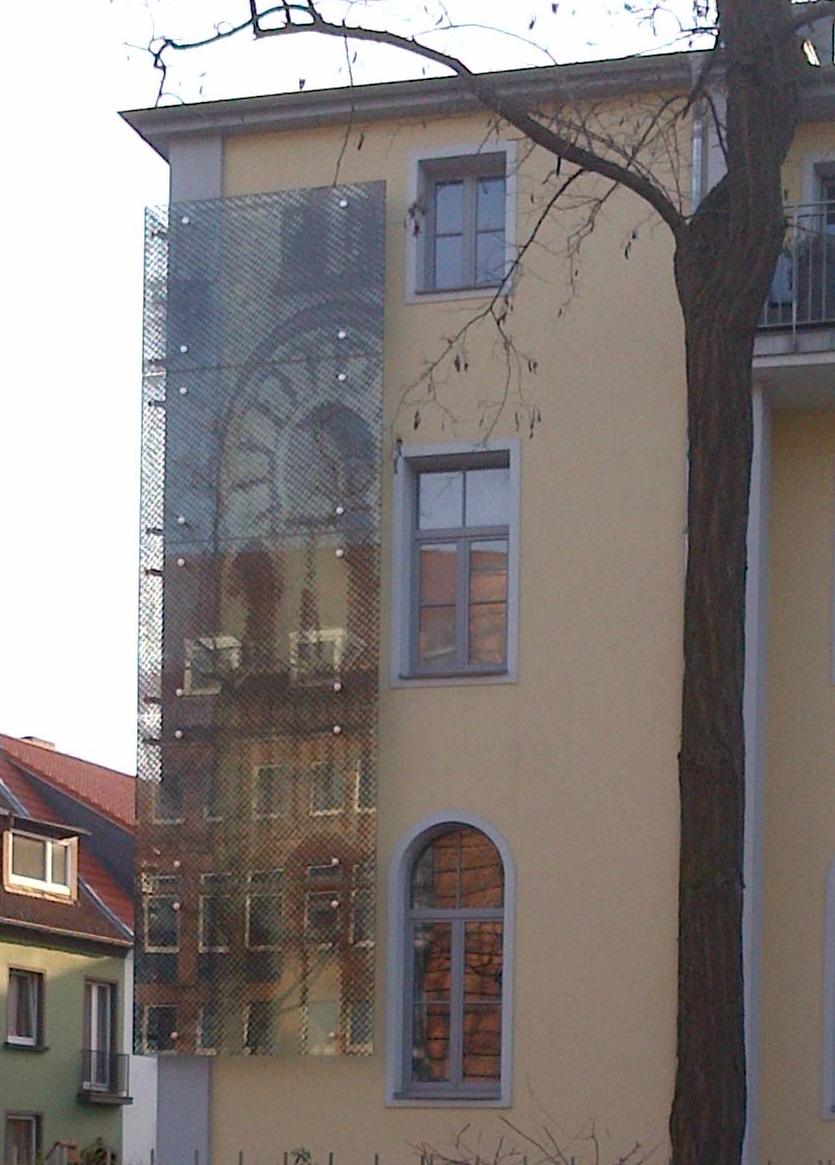 Ehemaliges jüdisches Krankenhaus Hannover - Glasinstallation, die die originale Fassade zitiert